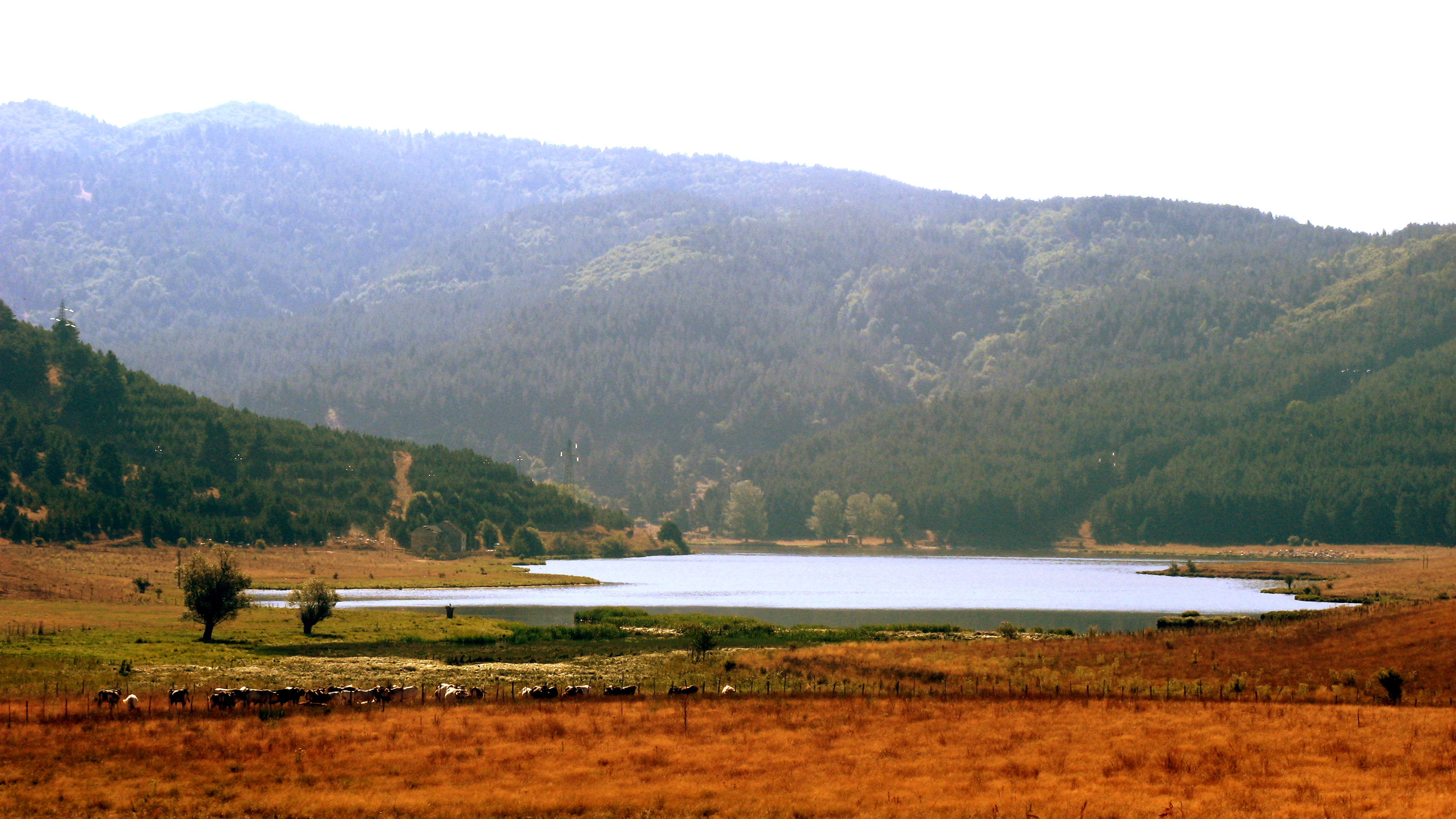 Lago di Ariamacina, Parco della Sila